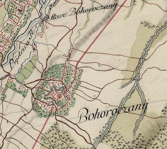 Богородчани на мапах Фрідріха фон Міґа (1779—1783)